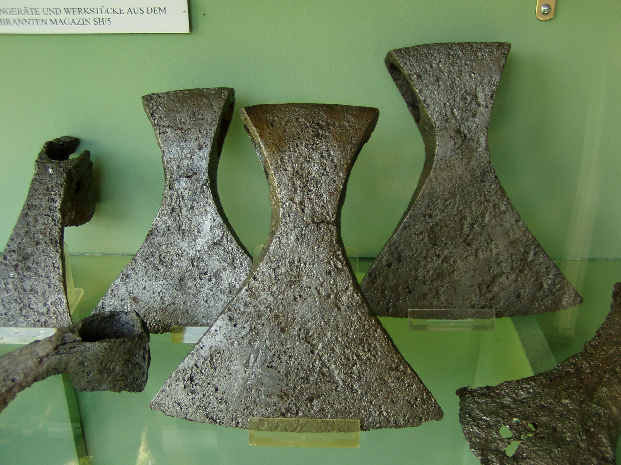 Stadt am Magdalensberg/City on the Magdalensberg, Eisenäxte/iron axes